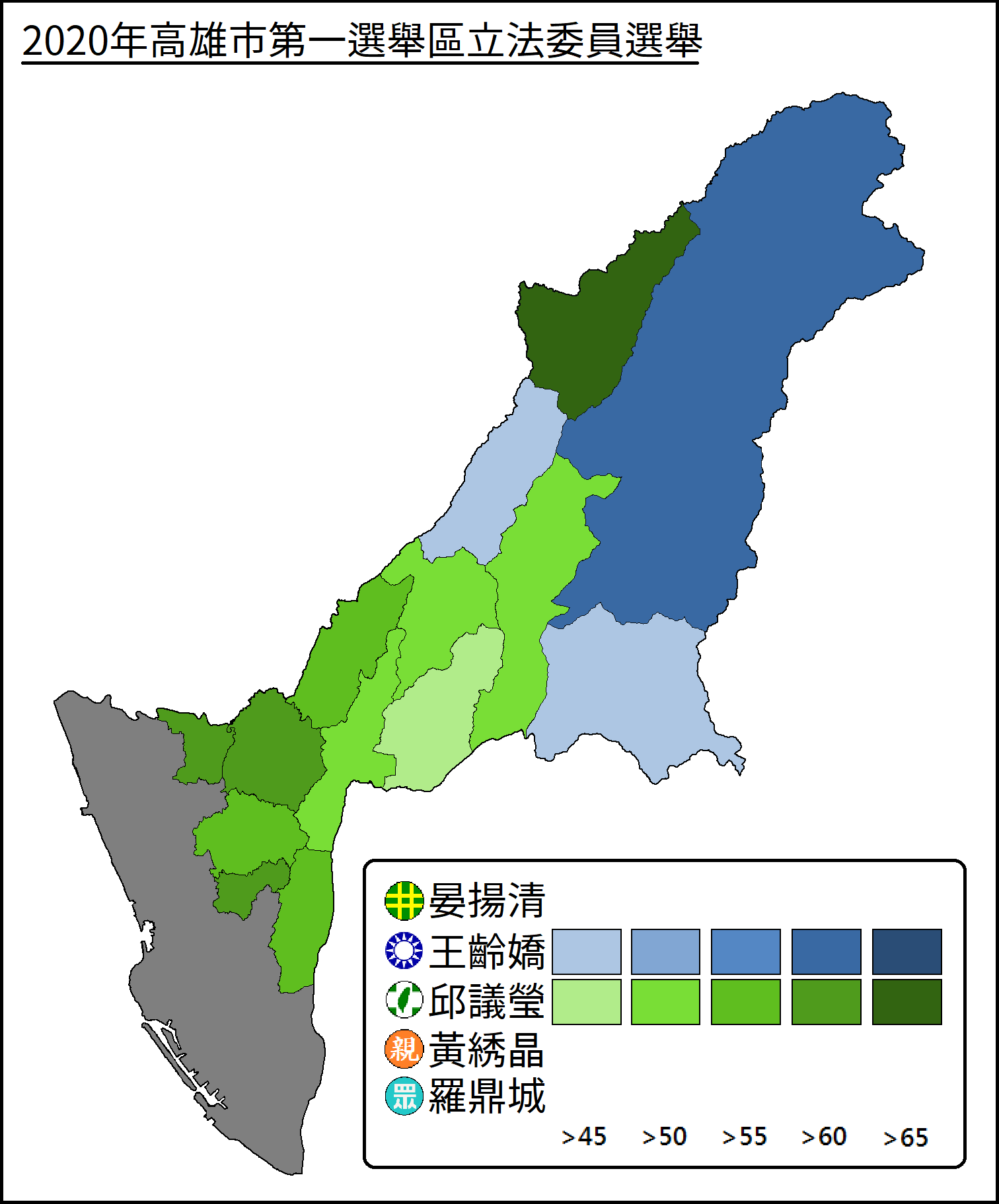 2020年高雄市第一選區立法委員選舉得票